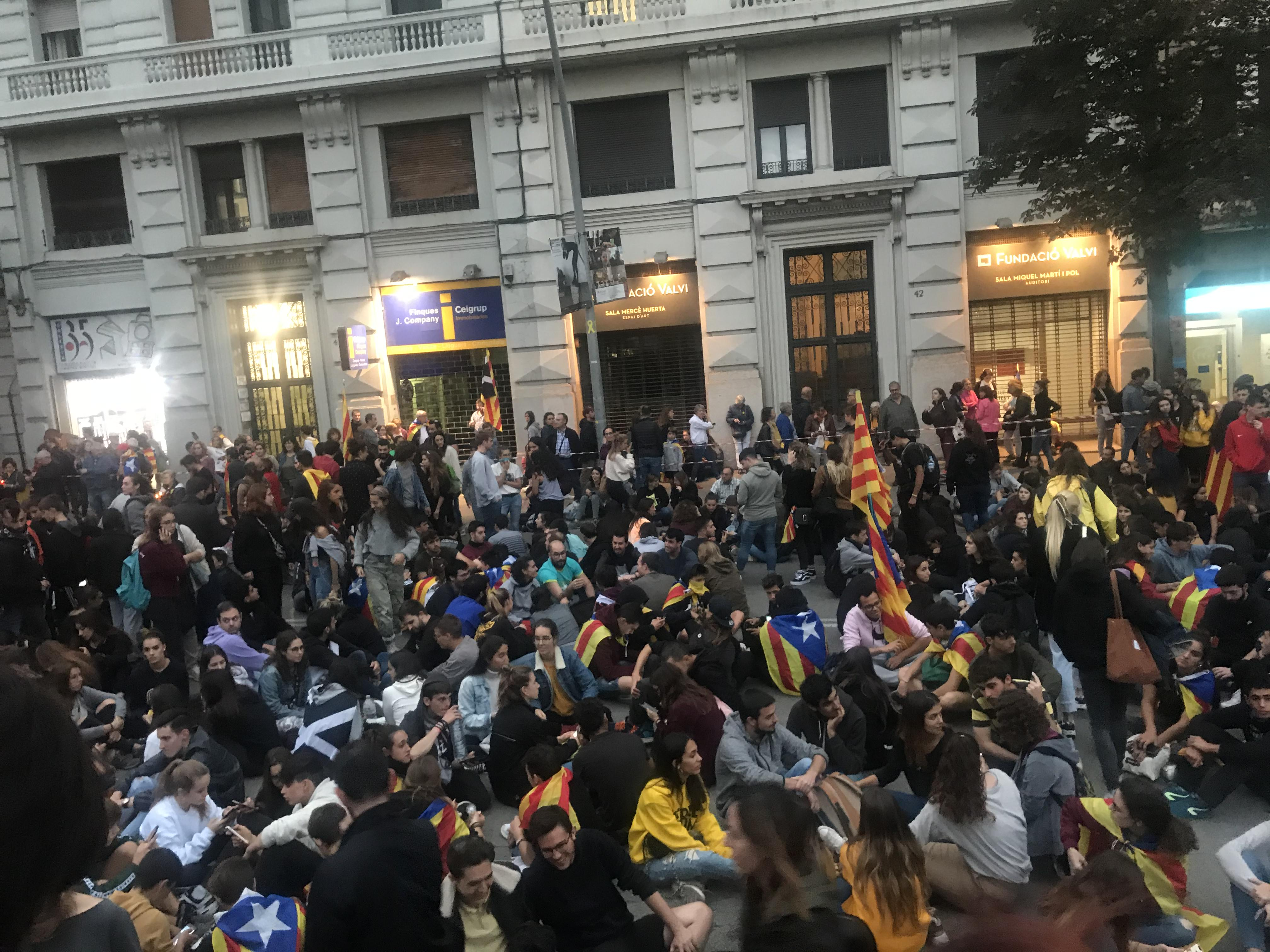 Protestes i aldarulls a Girona el dimarts 15 d'octubre de 2019. Seguda a la Gran Via Jaume I davant de la Subdelegació del Govern